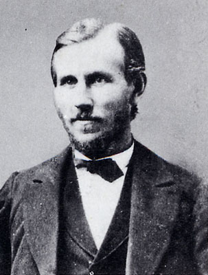 ジェローム・ディーン・デイヴィス（1838-1910）